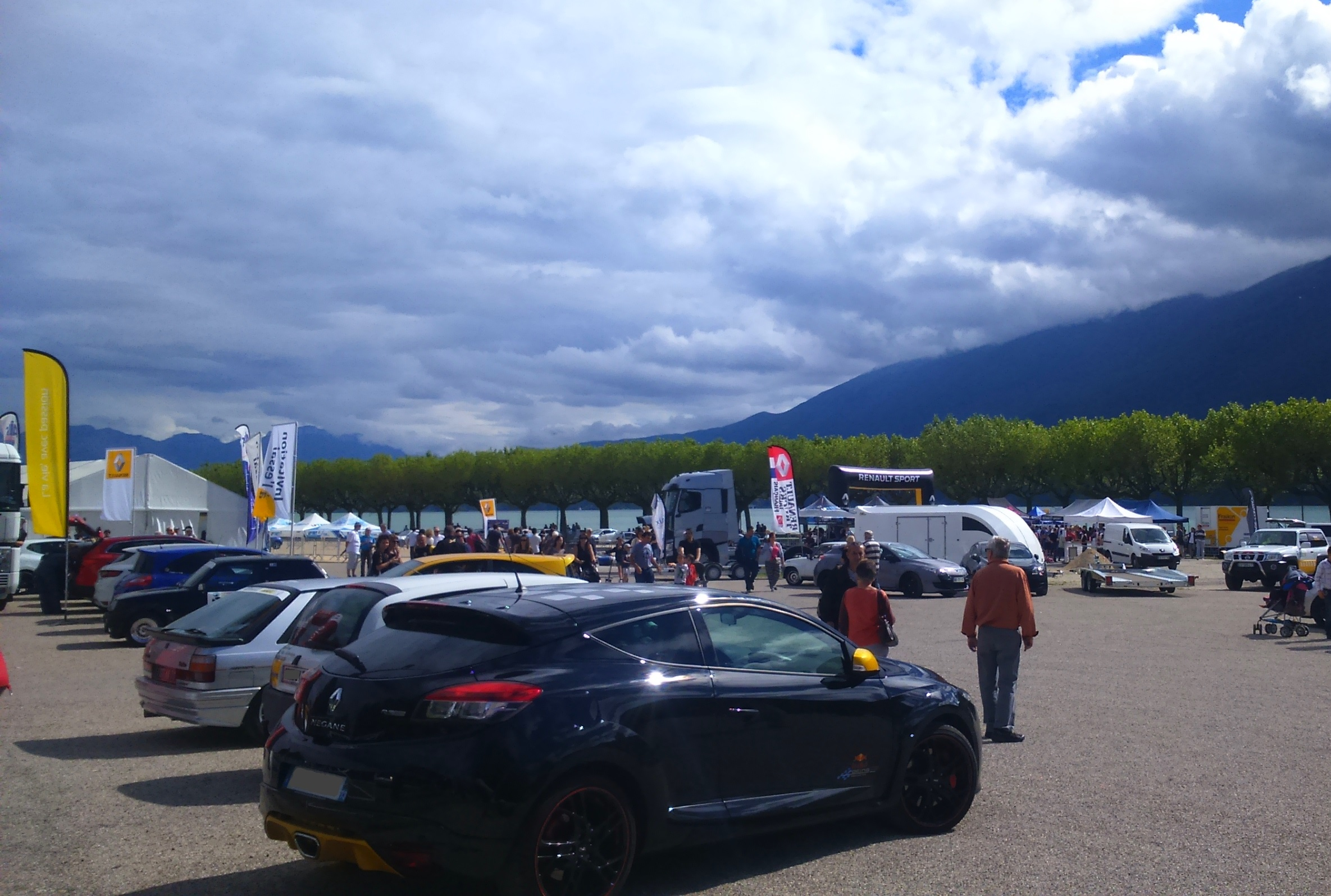 Rassemblement Renault Sport et Alpine sur l'esplanade du lac à Aix-les-Bains (Savoie) les 11 et 12 juin 2016.